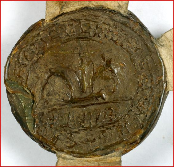 Sceau de Wales de Bertangles, seigneur de Querrieu et de sa femme Agnès, soeur et héritière de feu Gérard, chevalier, seigneur de Querrieu ( une fleur de lis coupée en partie inférieure), apposé sur un arrangement avec les chanoines de Saint-Firmin-le-Confesseur d'Amiens au sujet d'une rente, en 1292.